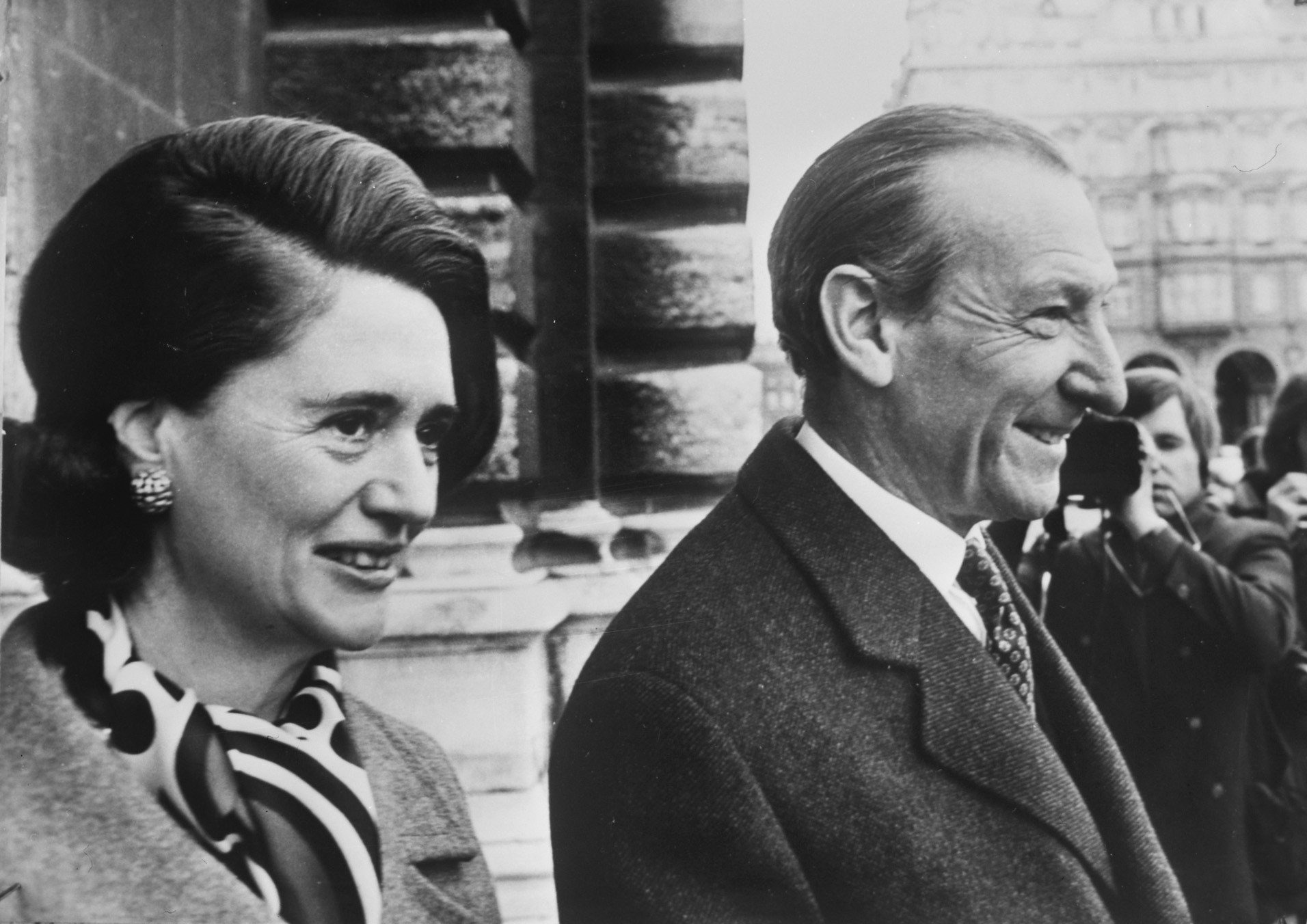 Dr. Kurt Waldheim (UNO ambassadeur Oostenrijk) voorgedragen als secretaris-generaal VN, Waldheim en echtgenote